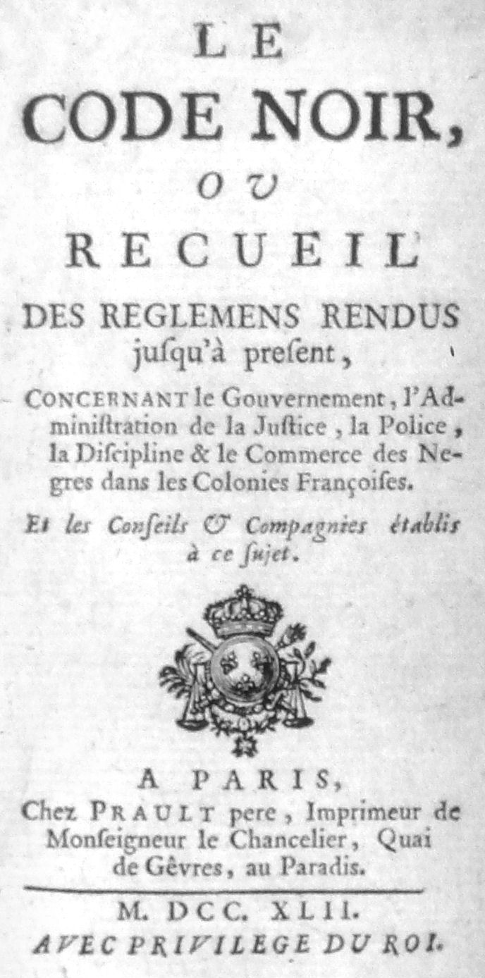 France, Louis XV, Prault pere.- Le Code Noir ou Recueil des réglemens rendus juſqu'à présent, Concernant le Gouvernement, d'Adminiſtration de la Juſtice, la Police, la Diſcipline & le Commerce des Negres dans les Colonies Françoiſses. Et les Conſeils & Compagnies établis à ce ſujet, A Paris, Chez Prault pere, Imprimeur de MonFeigneur le Chancelier, Quai de Gêvres, au Paradis. M. DCC. XLII. (1742), Avec Privilège du Roi.